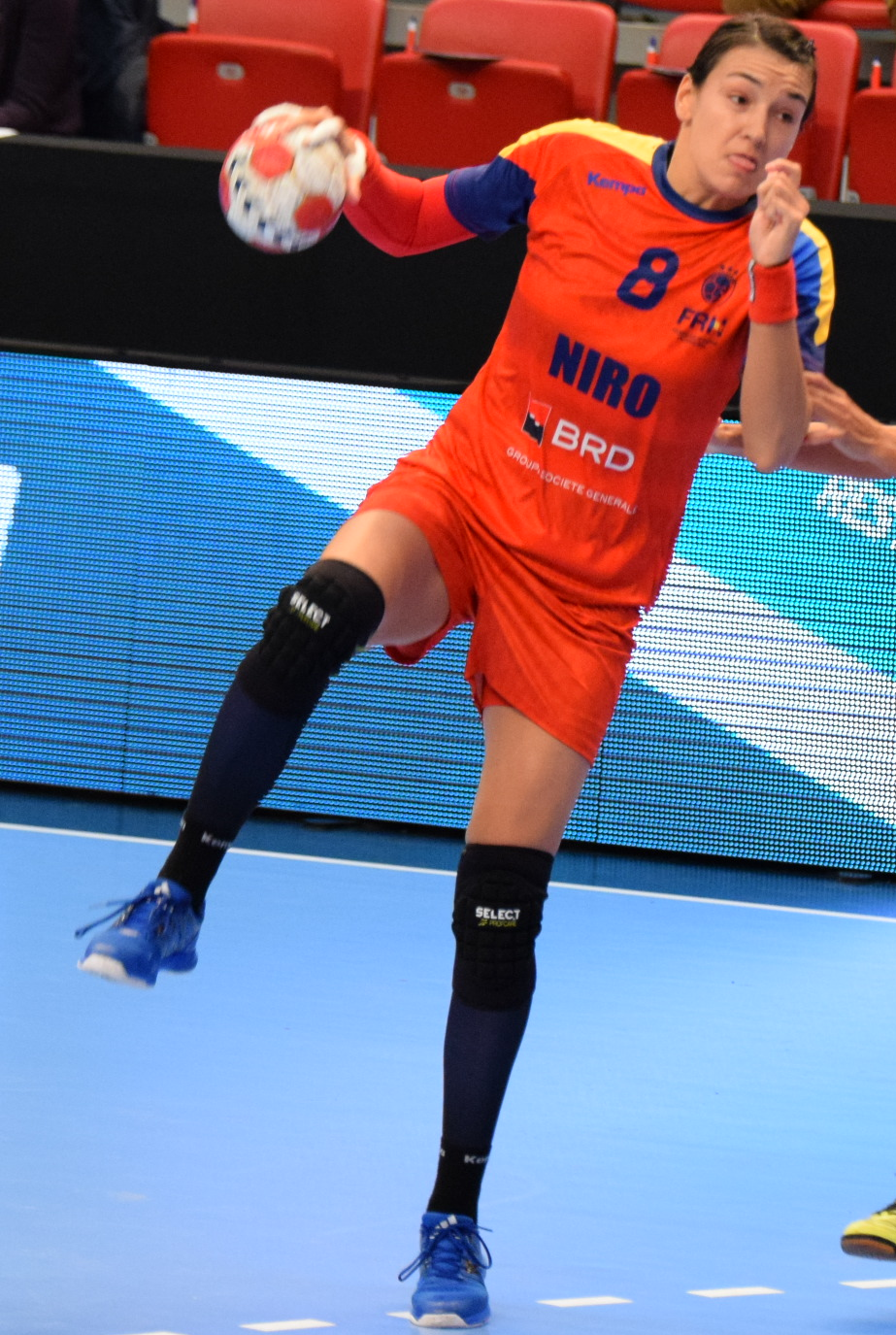 Cristina Neagu Le 29 novembre 2015, lors du match Roumanie / Cuba pour le compte du TIPIFF 2015. Au stade Pierre de Coubertin à Paris.